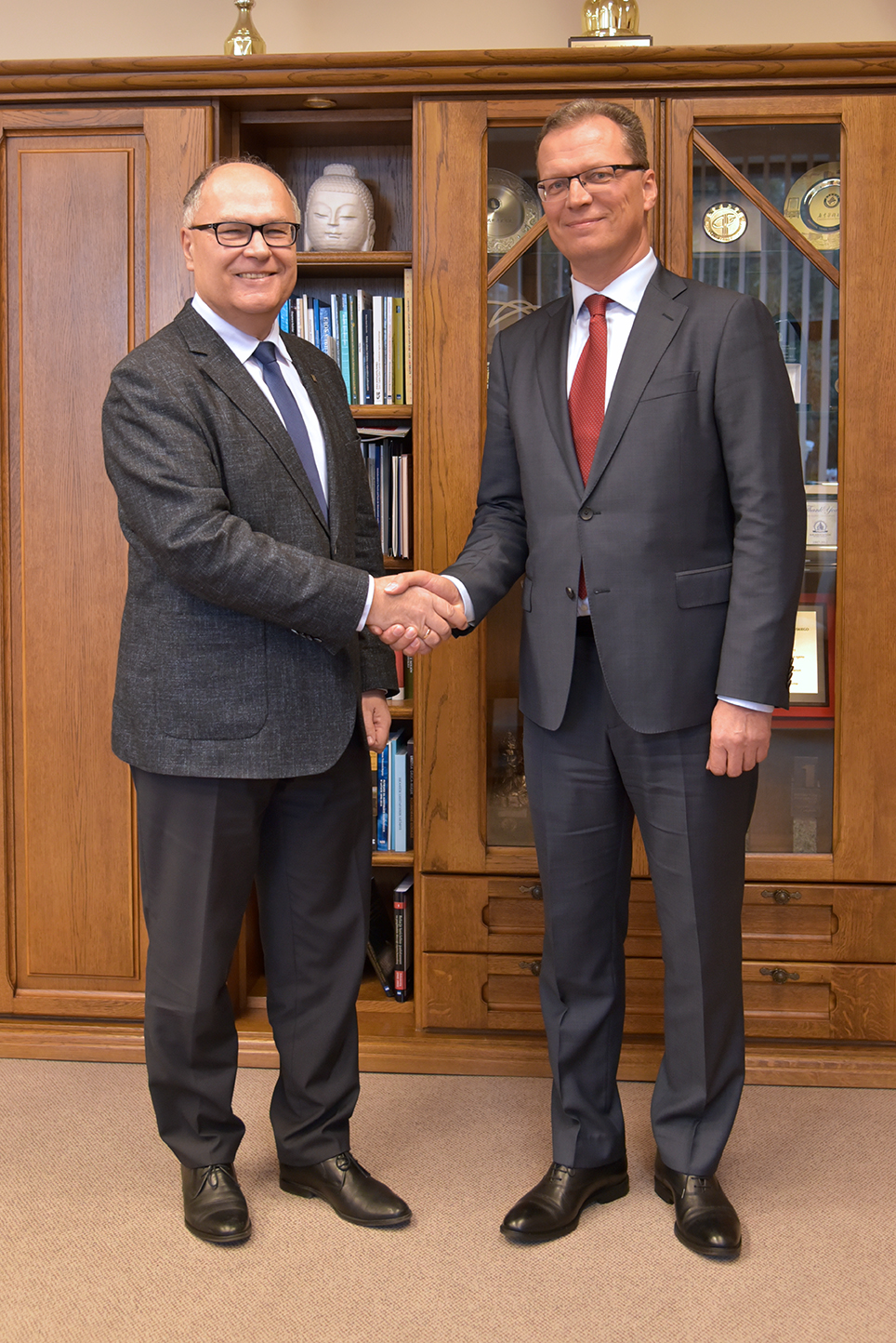 Od lewej: rektor Uniwersytetu Rzeszowskiego prof. Sylwester Czopek i ambasador RP na Słowacji Krzysztof Strzałka